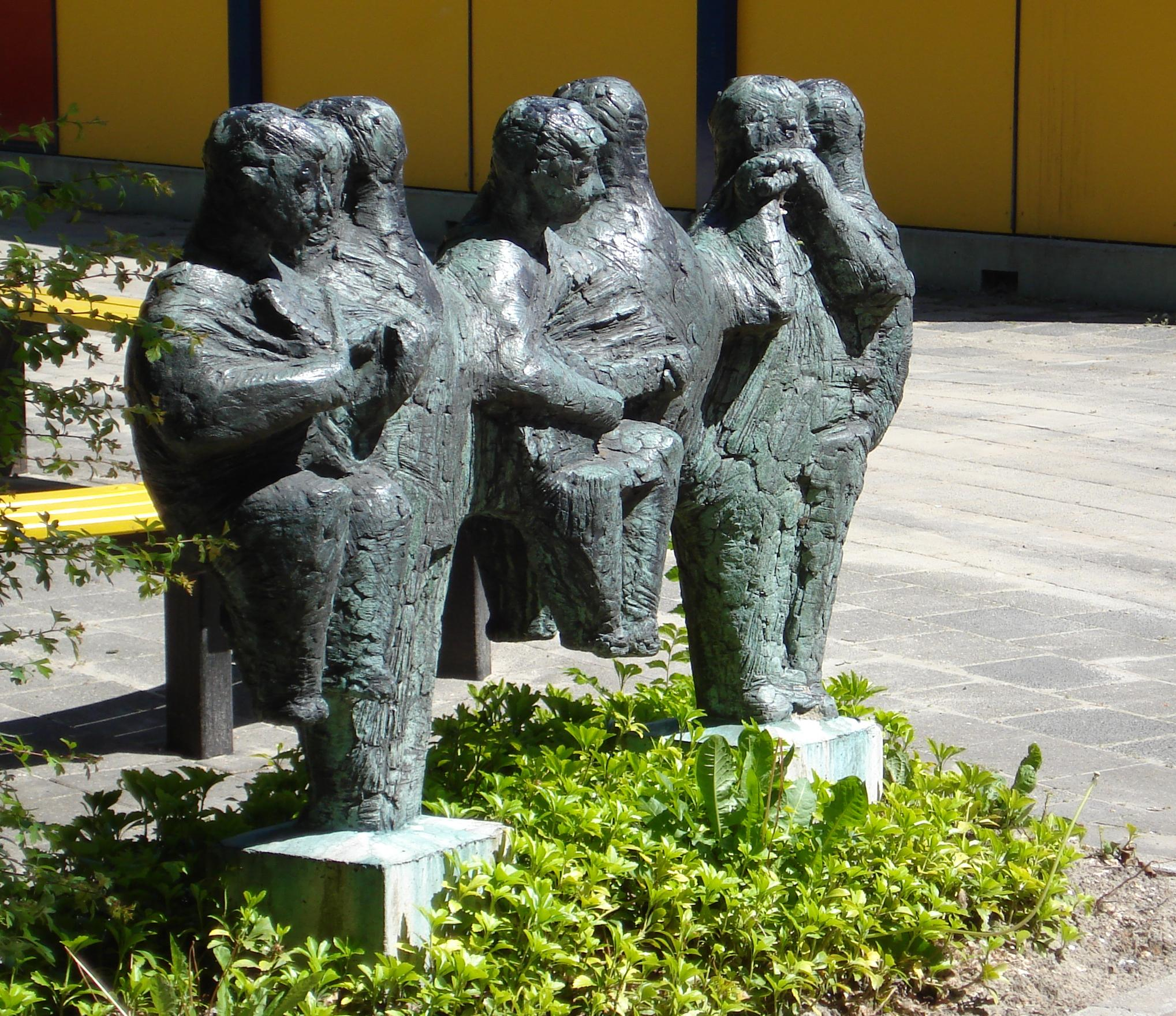 Rotterdam Hoogvliet, Holwinde. Kunstwerk "Muzikanten" van Geert Lebbing. Rotterdam/The Netherlands.